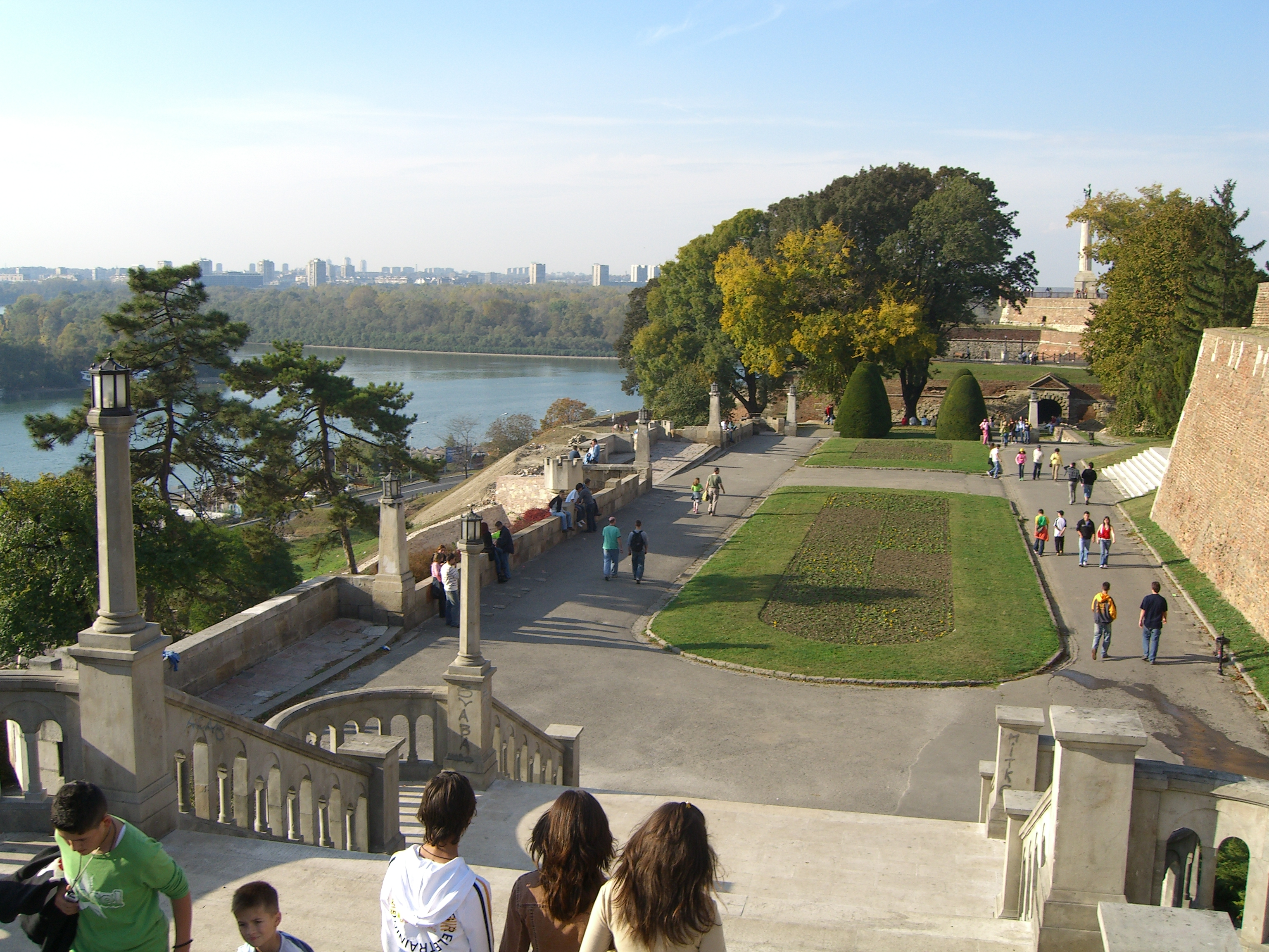 Kalemegdan Park (Belgrade) - Kalemegdan park (Beograd)